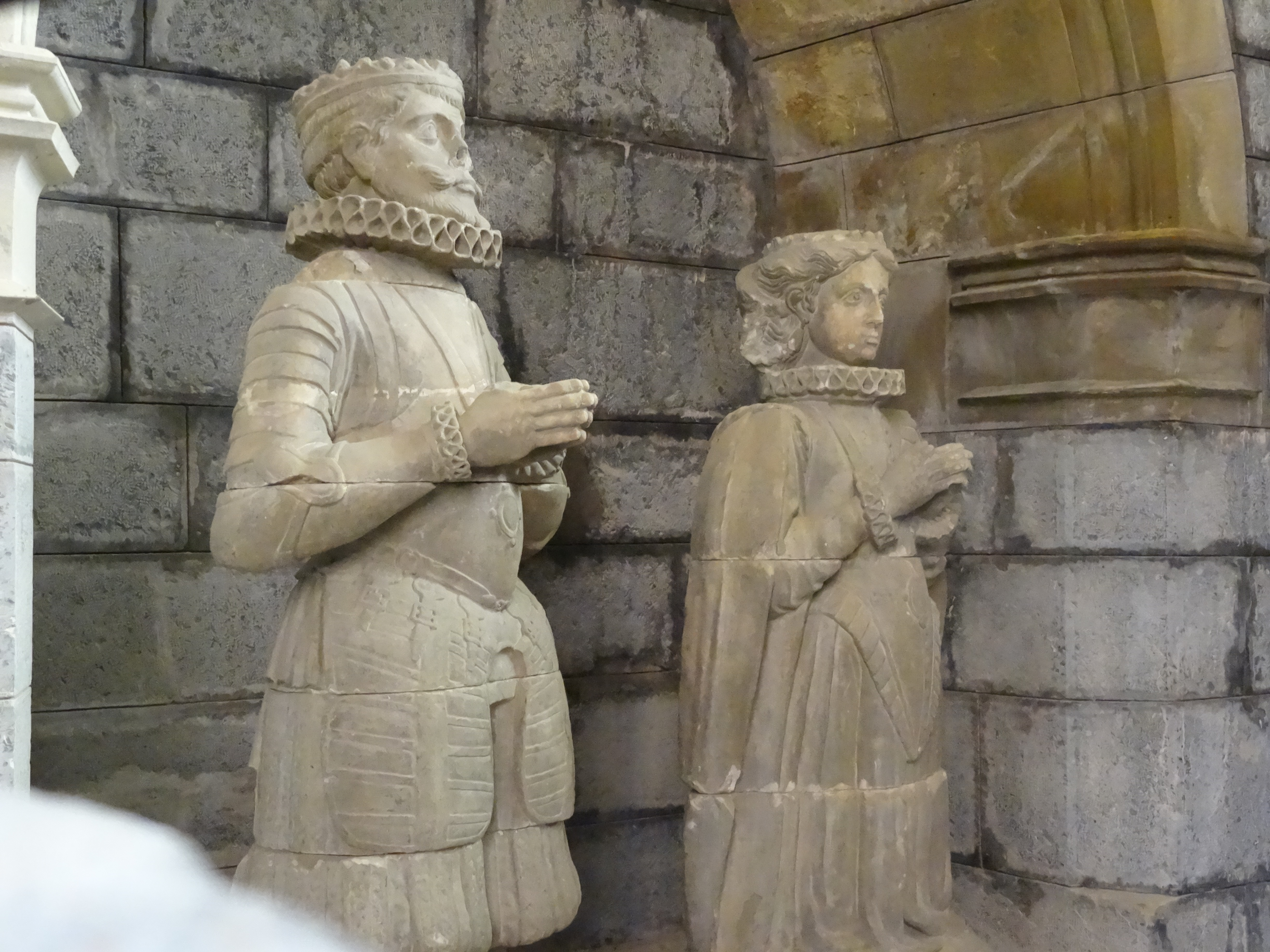 Estatuas orantes de los reyes Sancho VII y su esposa doña Clemencia.